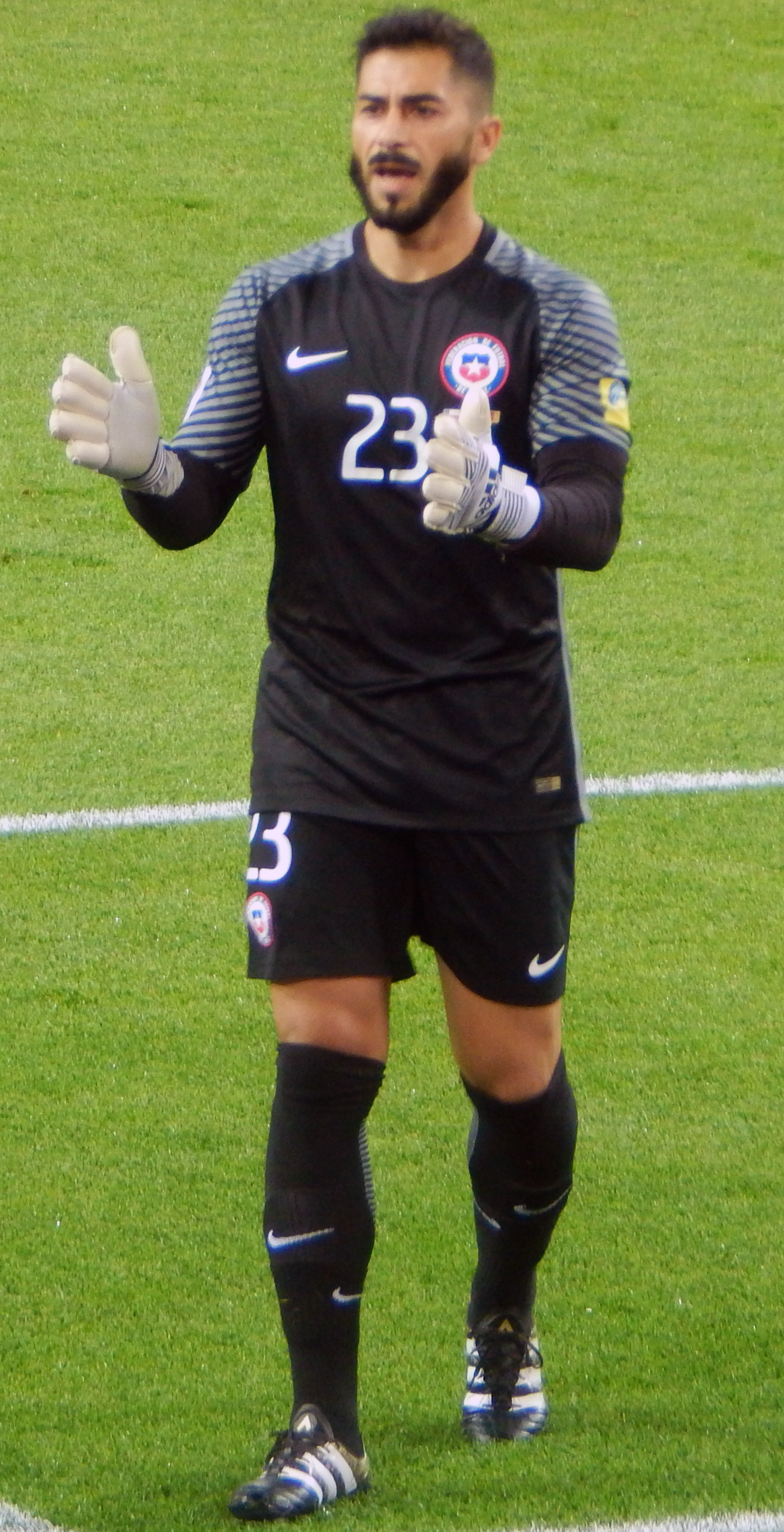 Джонни Эррера во время матча против сборной Камеруна